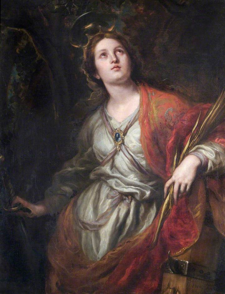 La obra representa a la santa Catalina de Alejandría.